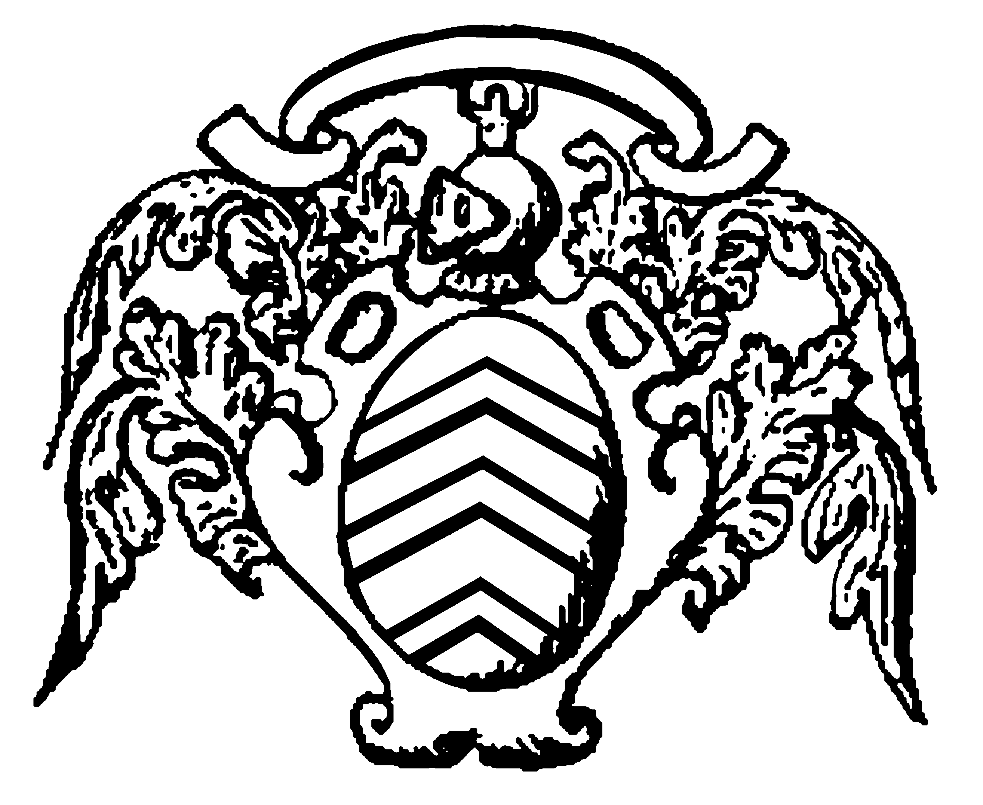 Grafik einer Nachzeichnung der Darstellung des Vollwappens am Gedenkstein von 1608 des Conte Francesco Brayda de' Signori di Corneliano (Grafen Francesco Brayda aus dem Haus der Herren von Corneliano), des Podestà von Bagnasco, die ein frühes Zeugnis der „heraldischen Verfallszeit“ ist. [1]